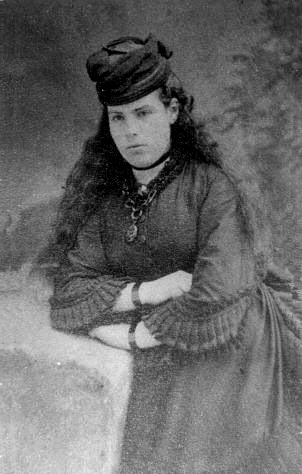 Fotografía de Eduarda García-Mansilla, tomada en Washington, Estados Unidos en el año 1875. Colección privada de Manuel Rafael García-Mansilla